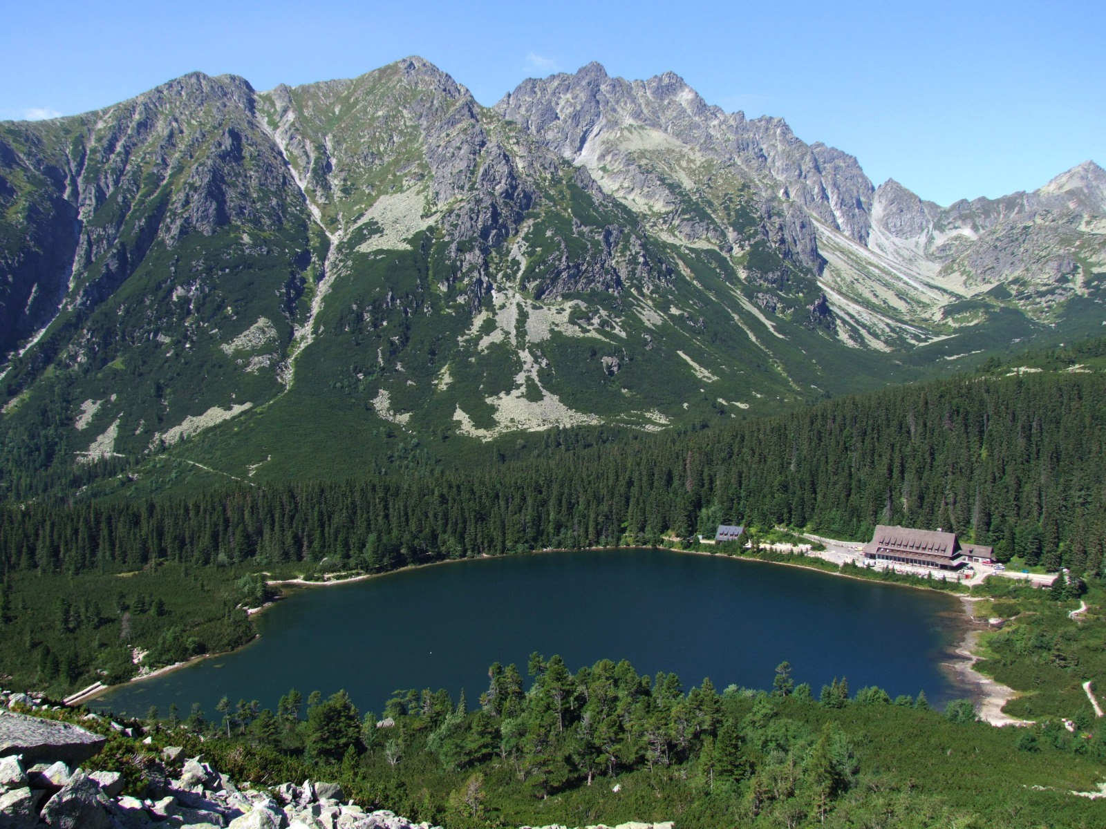 Popradzki Staw, Dolina Mięguszowiecka i grań Baszt. Widok z Osterwy